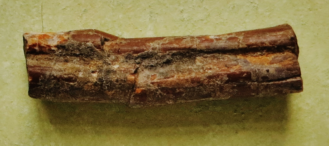 Fossil of Dimetrodon- Took the picture at Natural History Museum, Bonn University